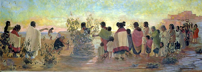 Hopi Indian Sun Ceremony